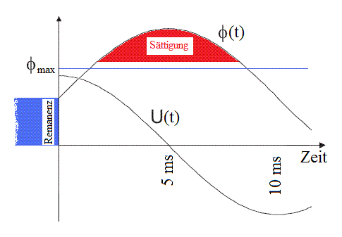 Magnetfluss mit Remanenz